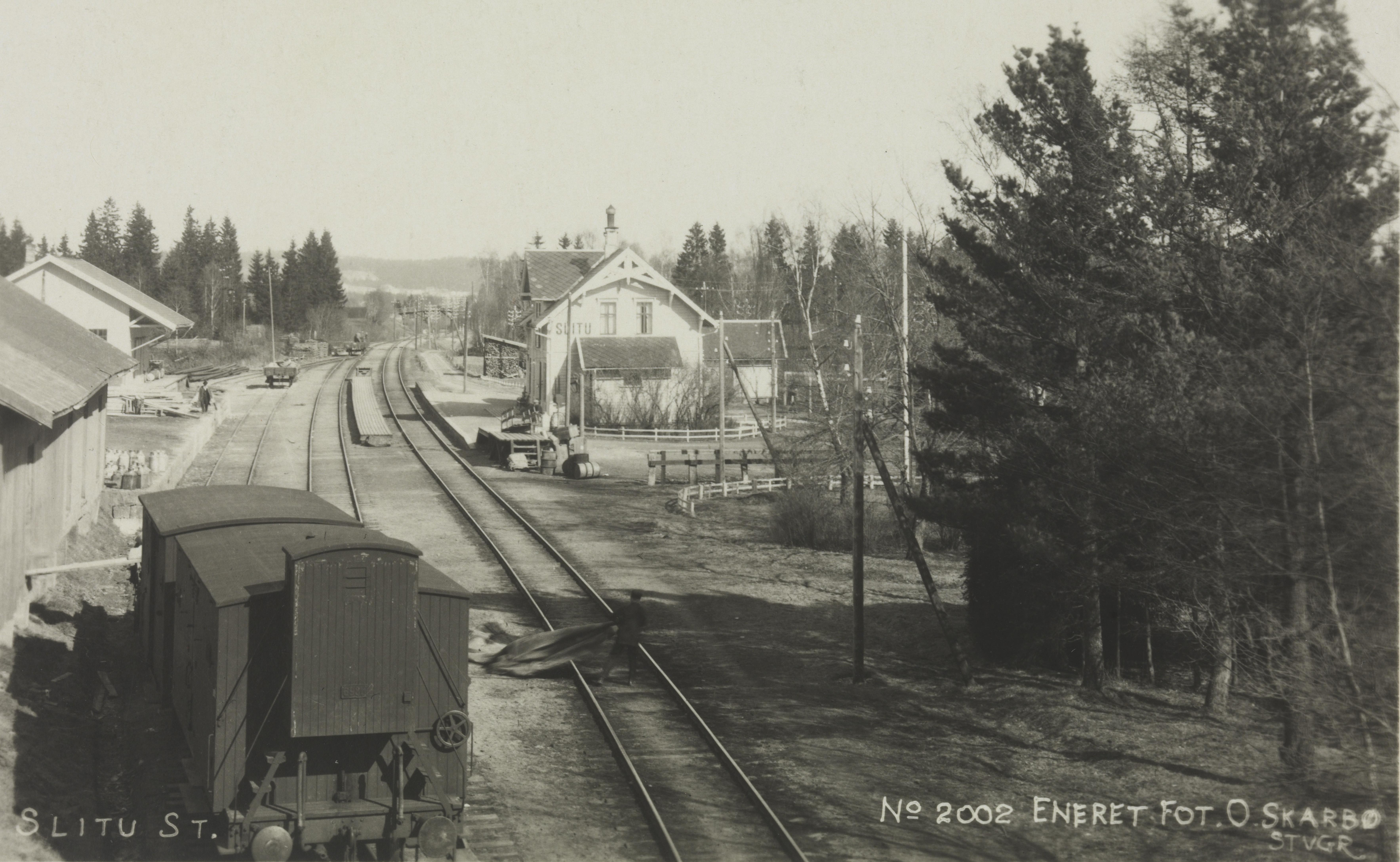 Slitu stasjon på 1920-tallet. Godsvogn med bremserrom i forgrunnen. Bildet er hentet fra Nasjonalbibliotekets bildesamling Slitu, Eidsberg, Østfold